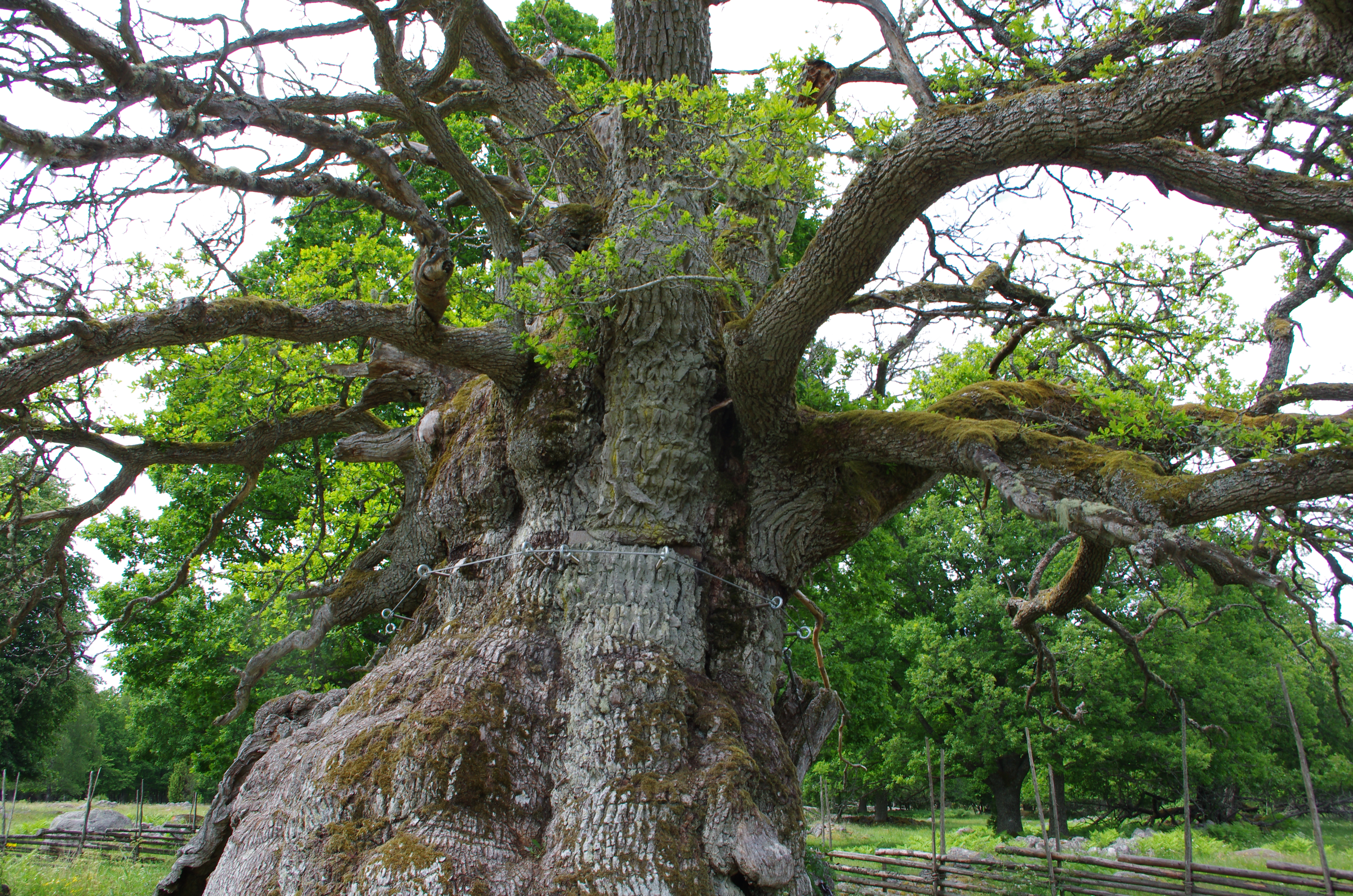 Stålbandet som tidigare höll ihop eken, men som skar in i barken och hindrade vattentransporten upp i trädet, har ersatts av en stålvajer på distans.